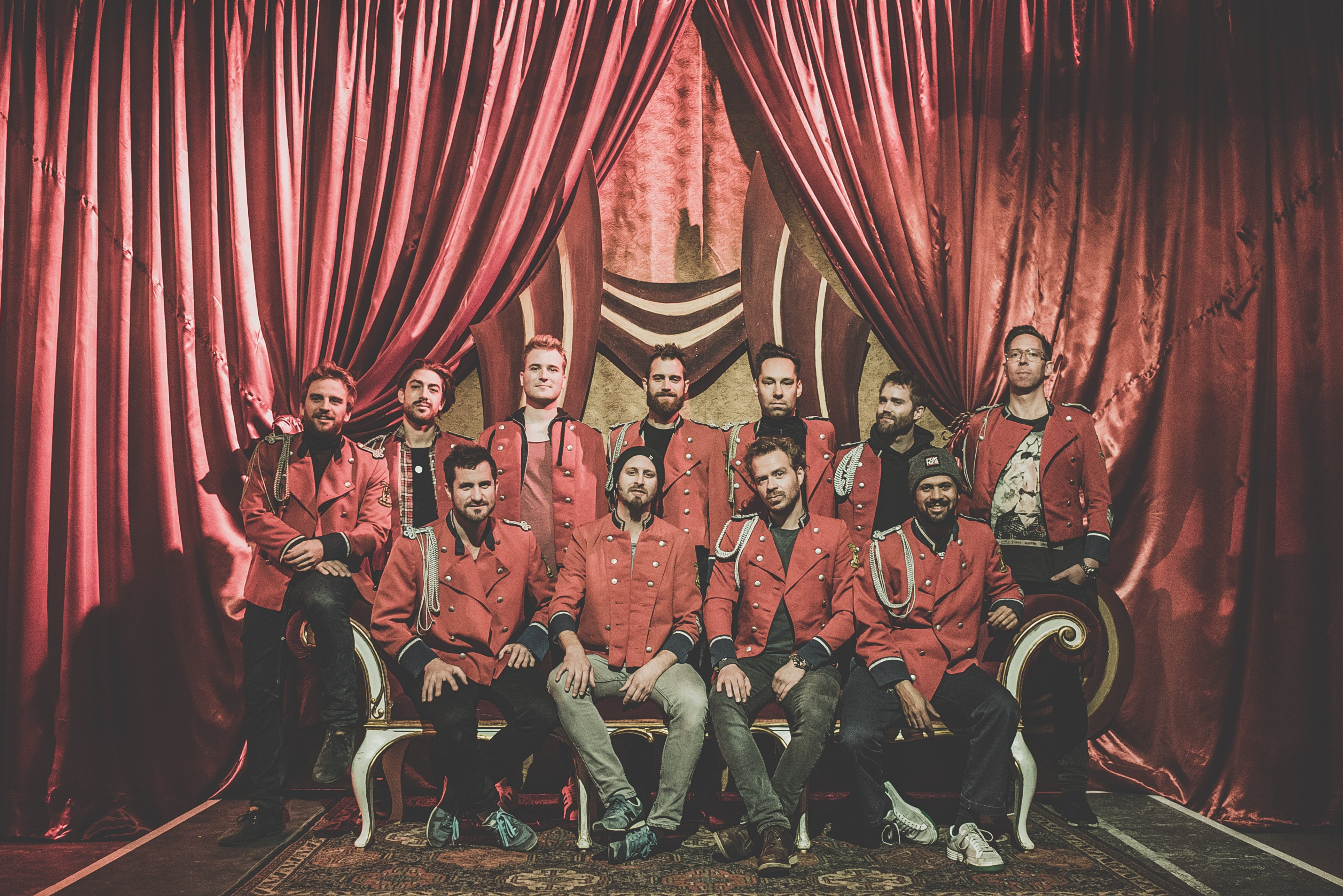 MEUTE - Techno Marching Band